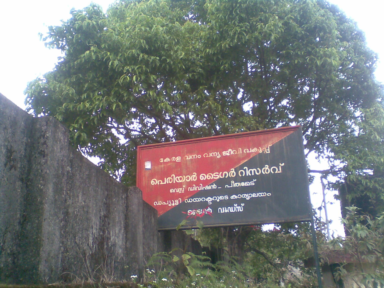 വനം വകുപ്പ് ഓഫിസിന്റെ സൂചനാ ബോർഡ്